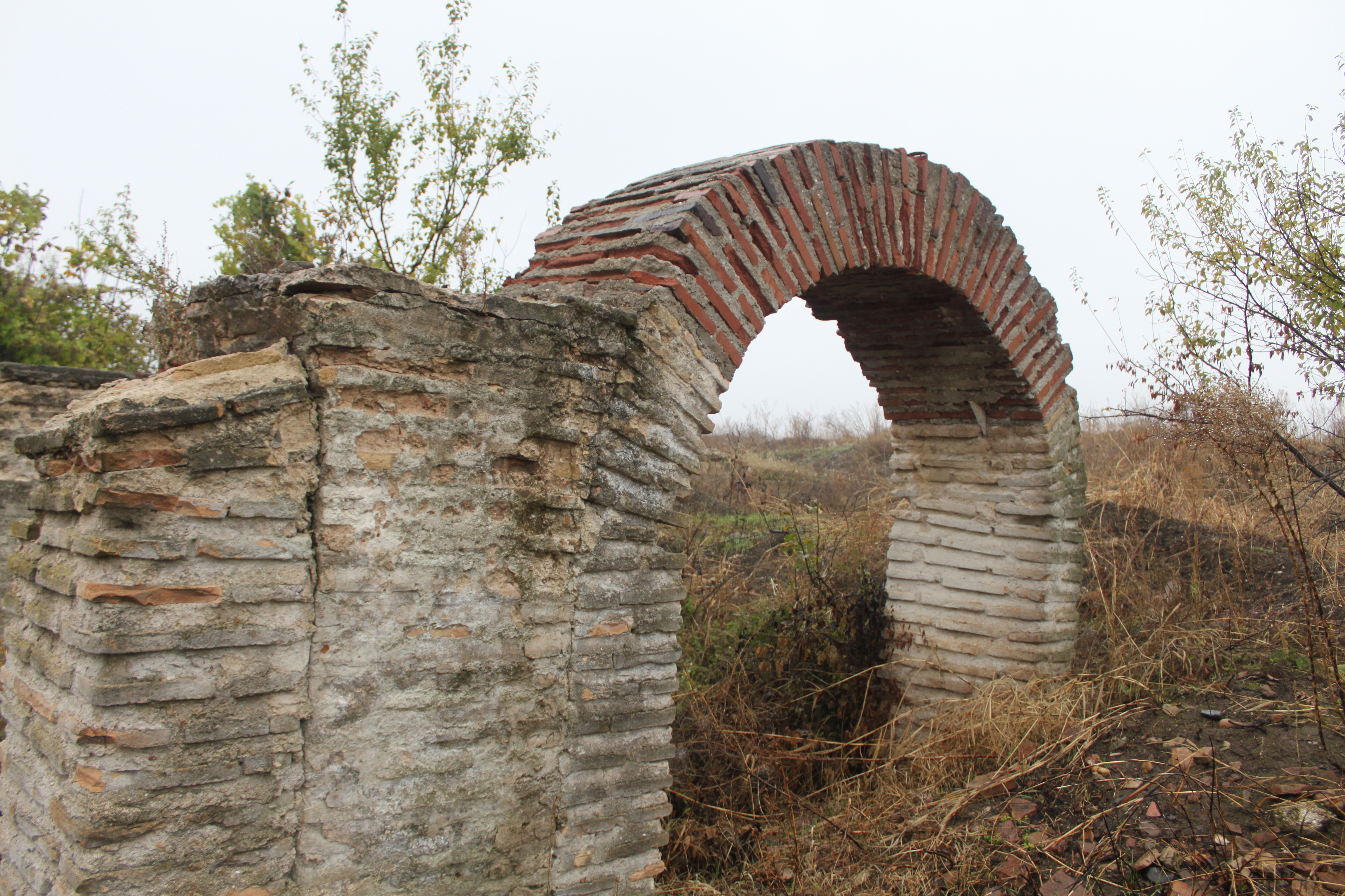 die antike römische Stadt Ratiaria; bei Archar an der Donau - östlich von Widin; das ca. 2 x2 km große Gelände wurde von Schatzsuchern monatelang systematisch mit Baggern umgegraben und druchsiebt, so dass alle archäologischen Schichten und Funde zerstört sind; nur an einer Stelle ist ein gemauerter Bogen übrig geblieben